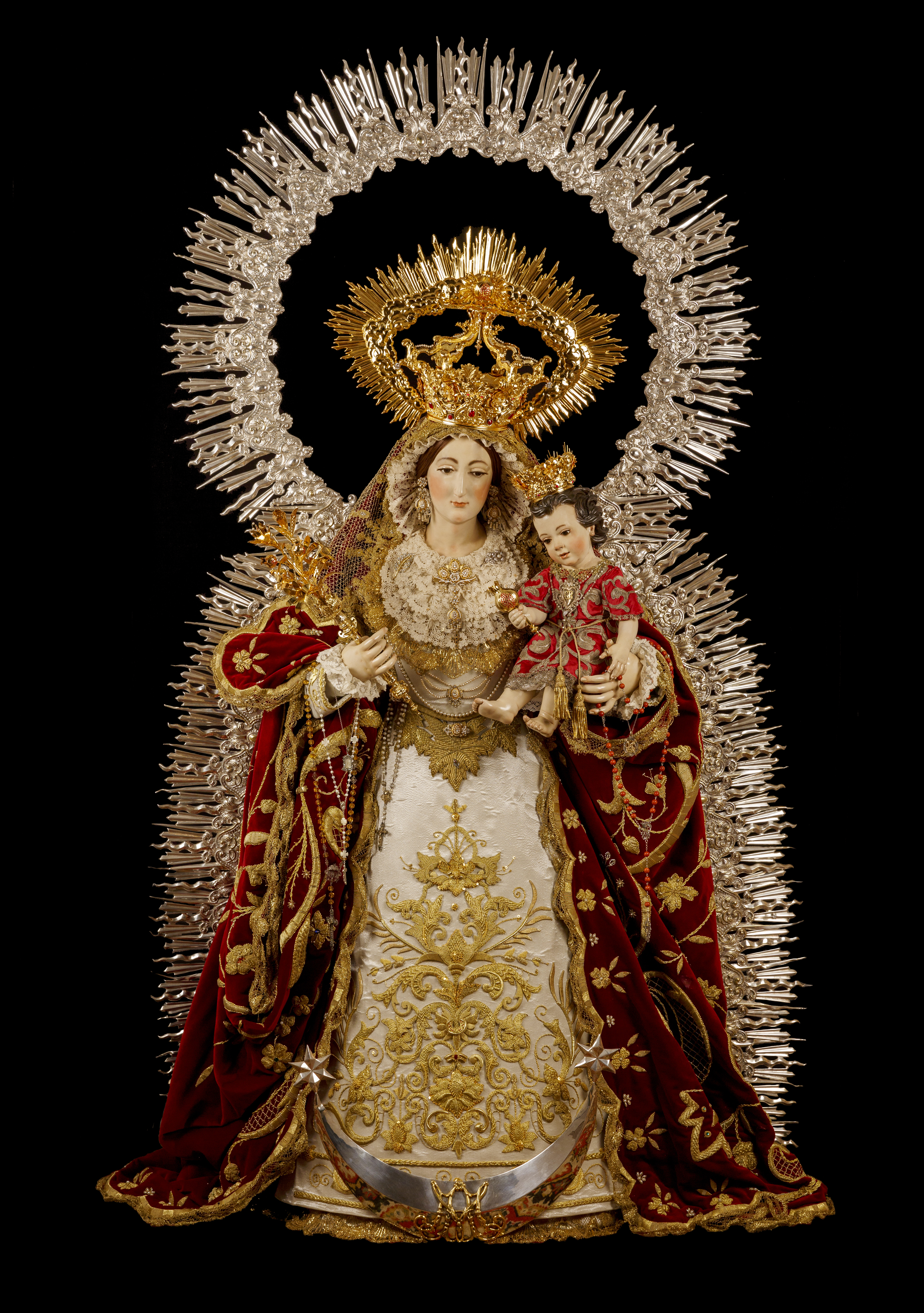 Imagen de Nuestra Señora de la Granada, de Granada, fotografiada por Sergio Aguayo con motivo de la bendición de la talla, el 21 de abril de 2018